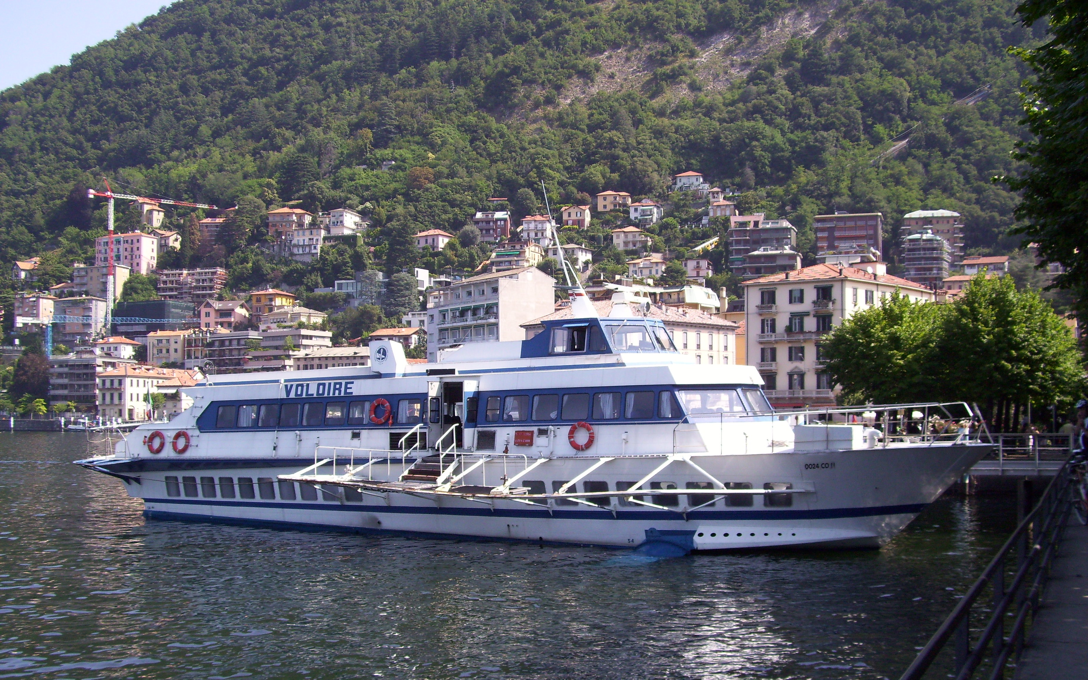 Aliscafo "Voloire" (RHS 150 FL) a Como